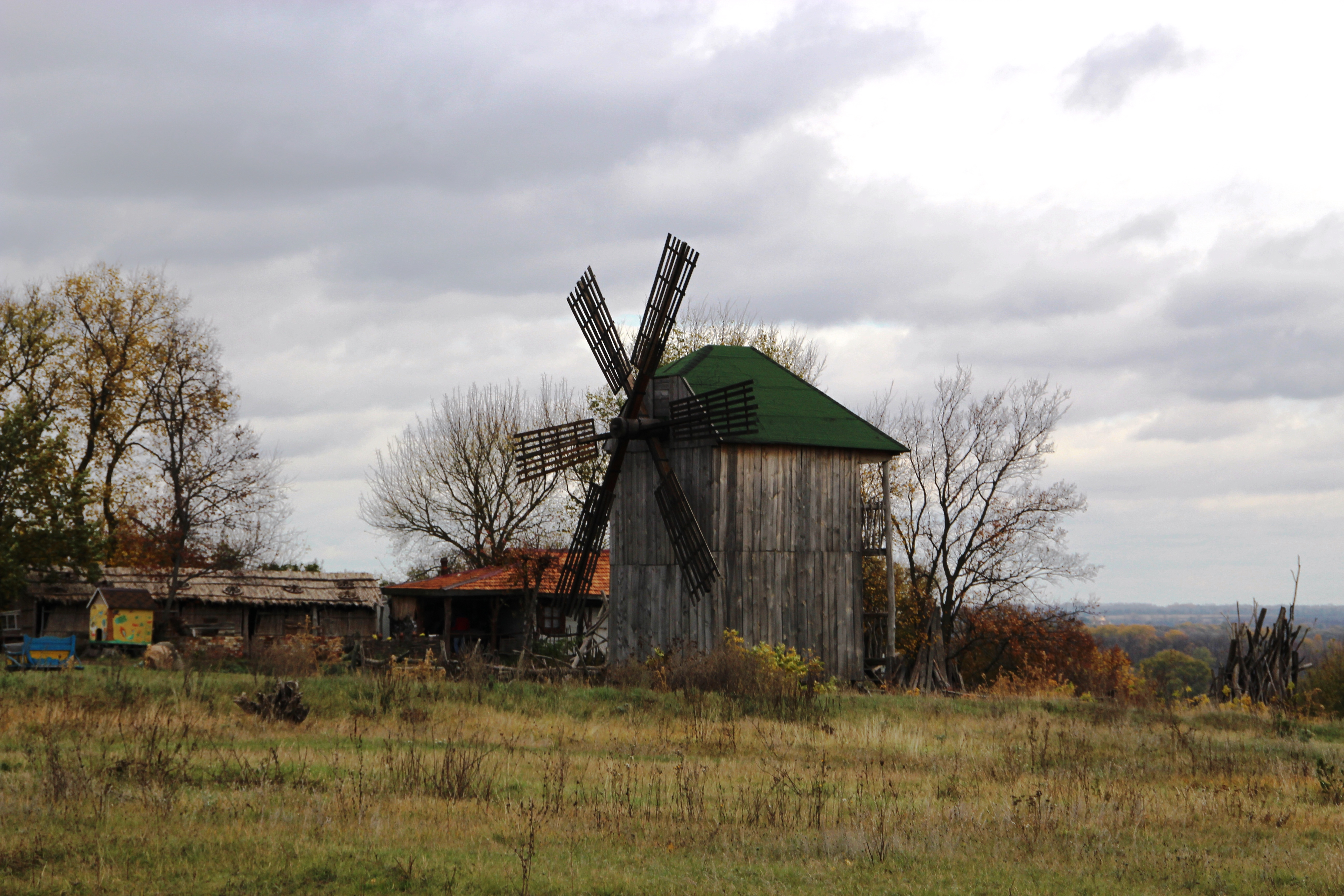 село Констянтинів Недригайлівський район дерев'яний вітряк